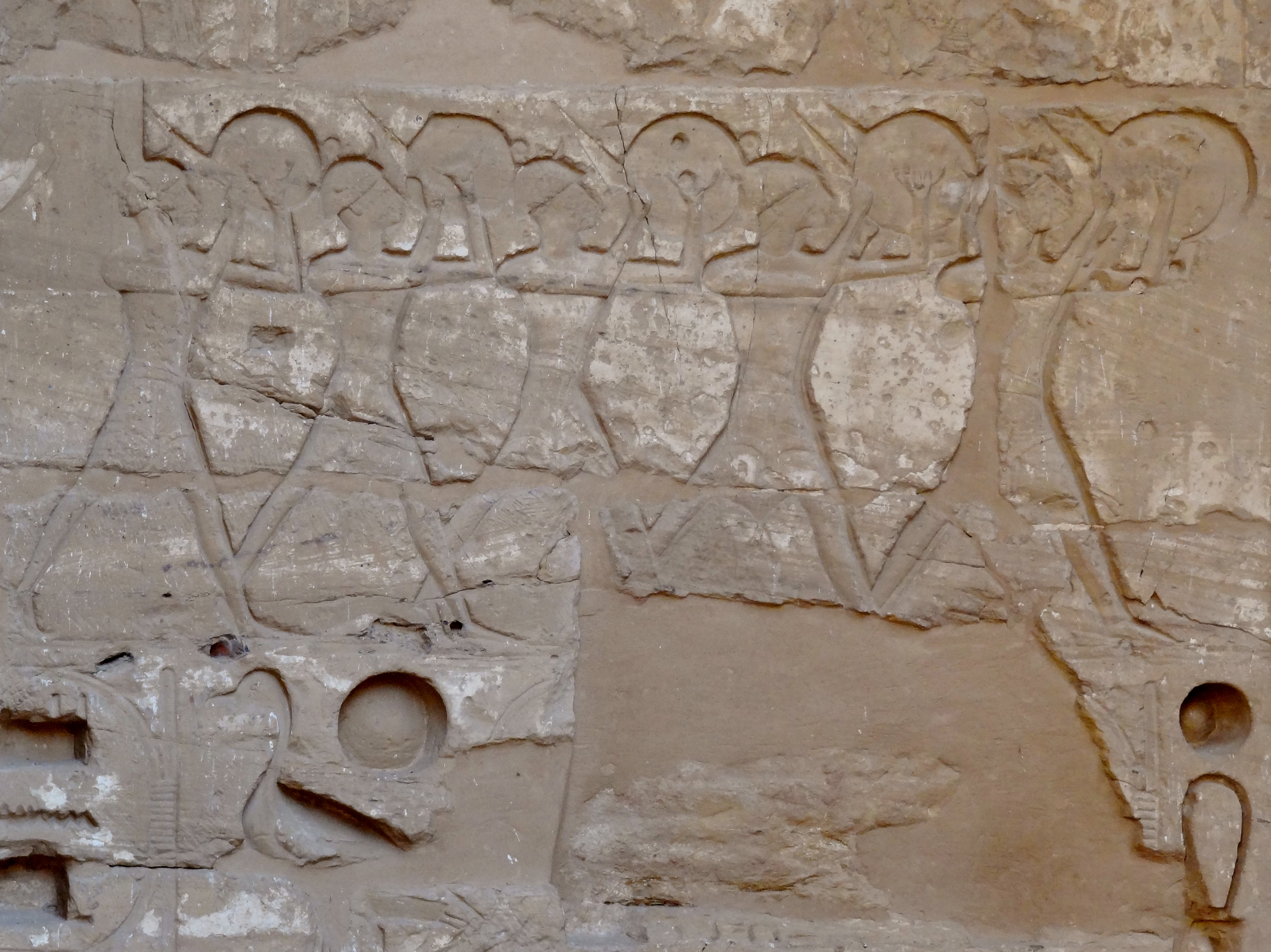 Kriegerdarstellungen der Scherden (Schardana) an der Nordostwand im ersten Hof des Totentempels Ramses’ III. in Medinet Habu, Ägypten